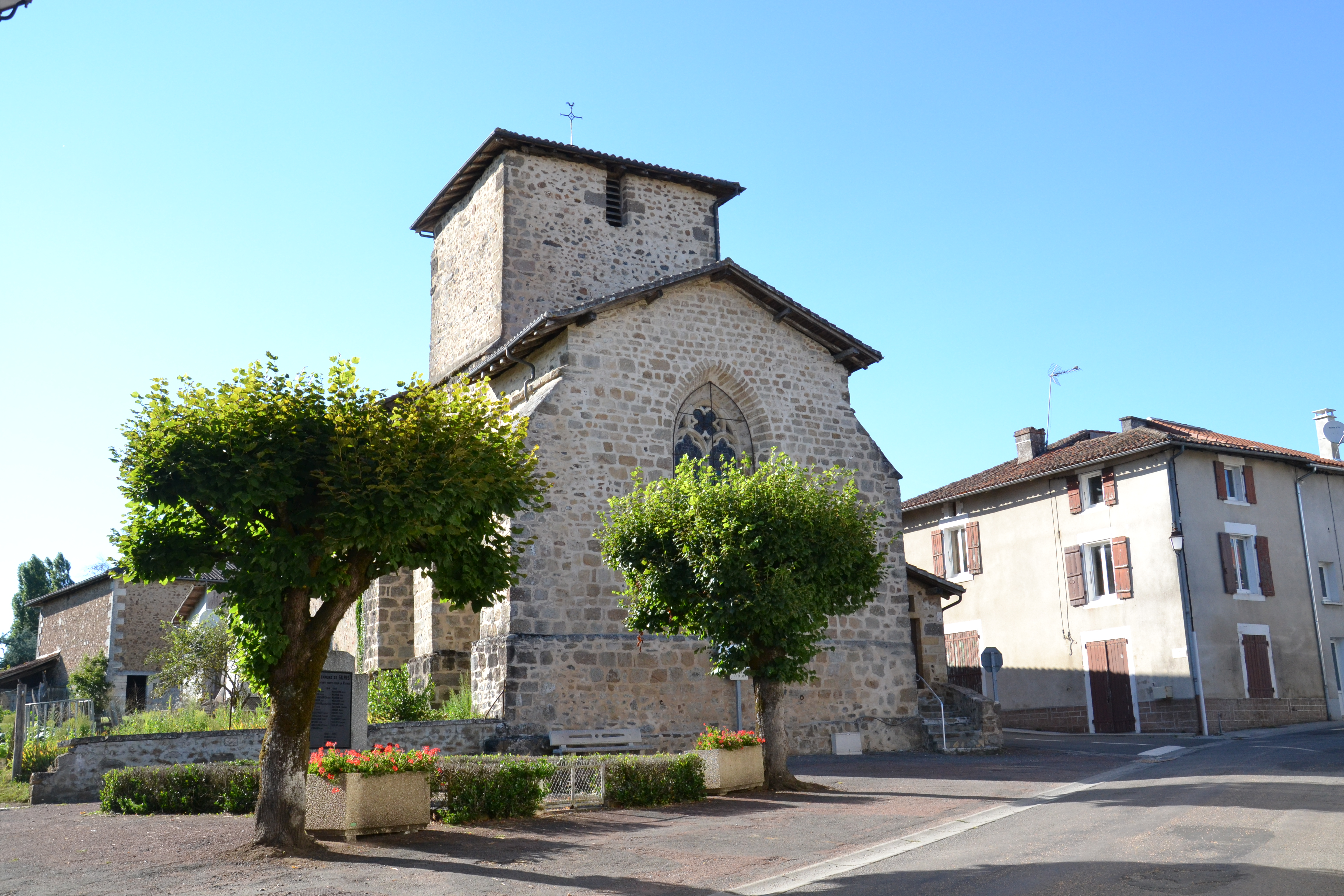 Église de Suris (Charente, France)